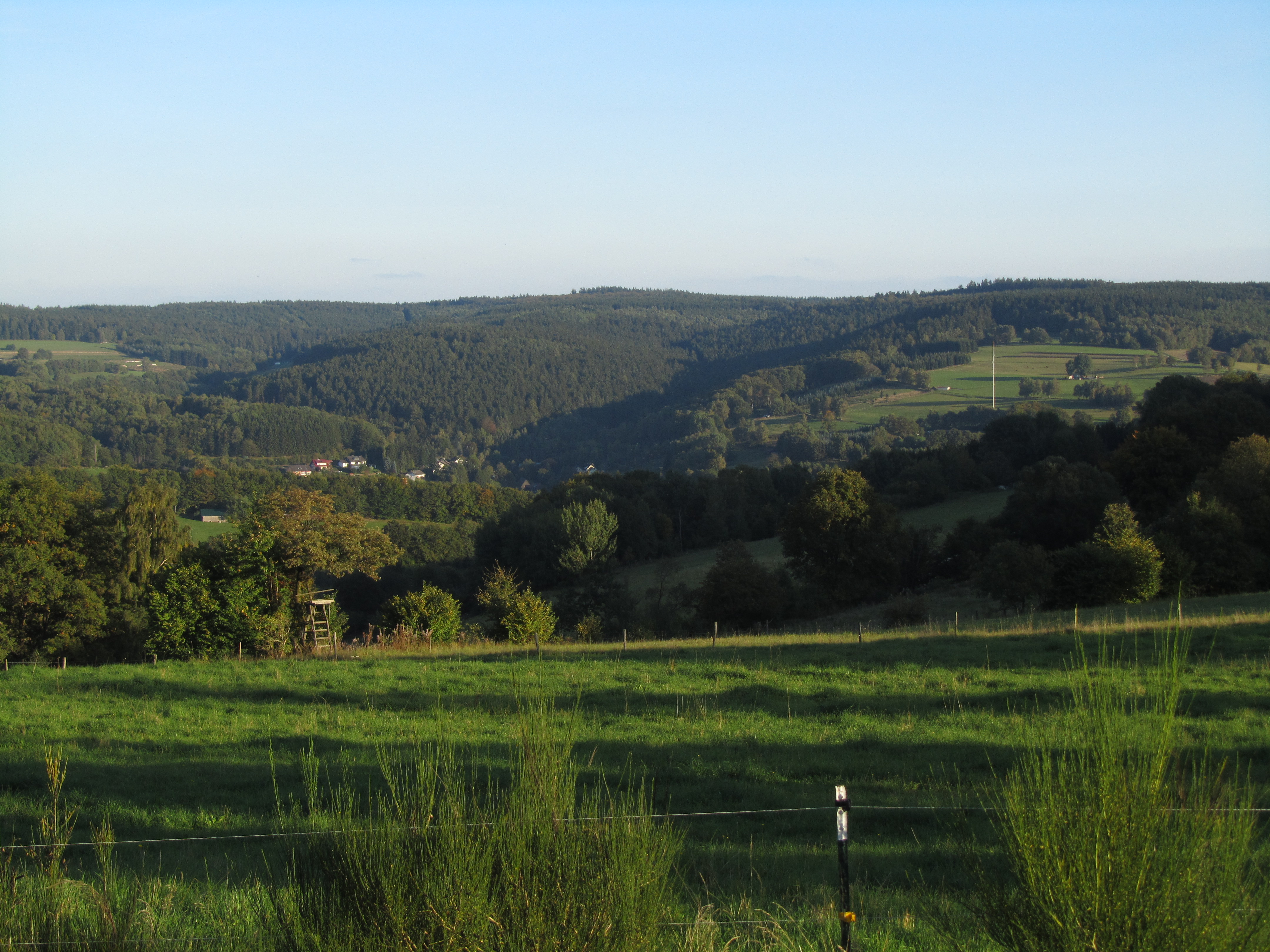 Die Hermannskoppe im Spessart von Nordwesten.